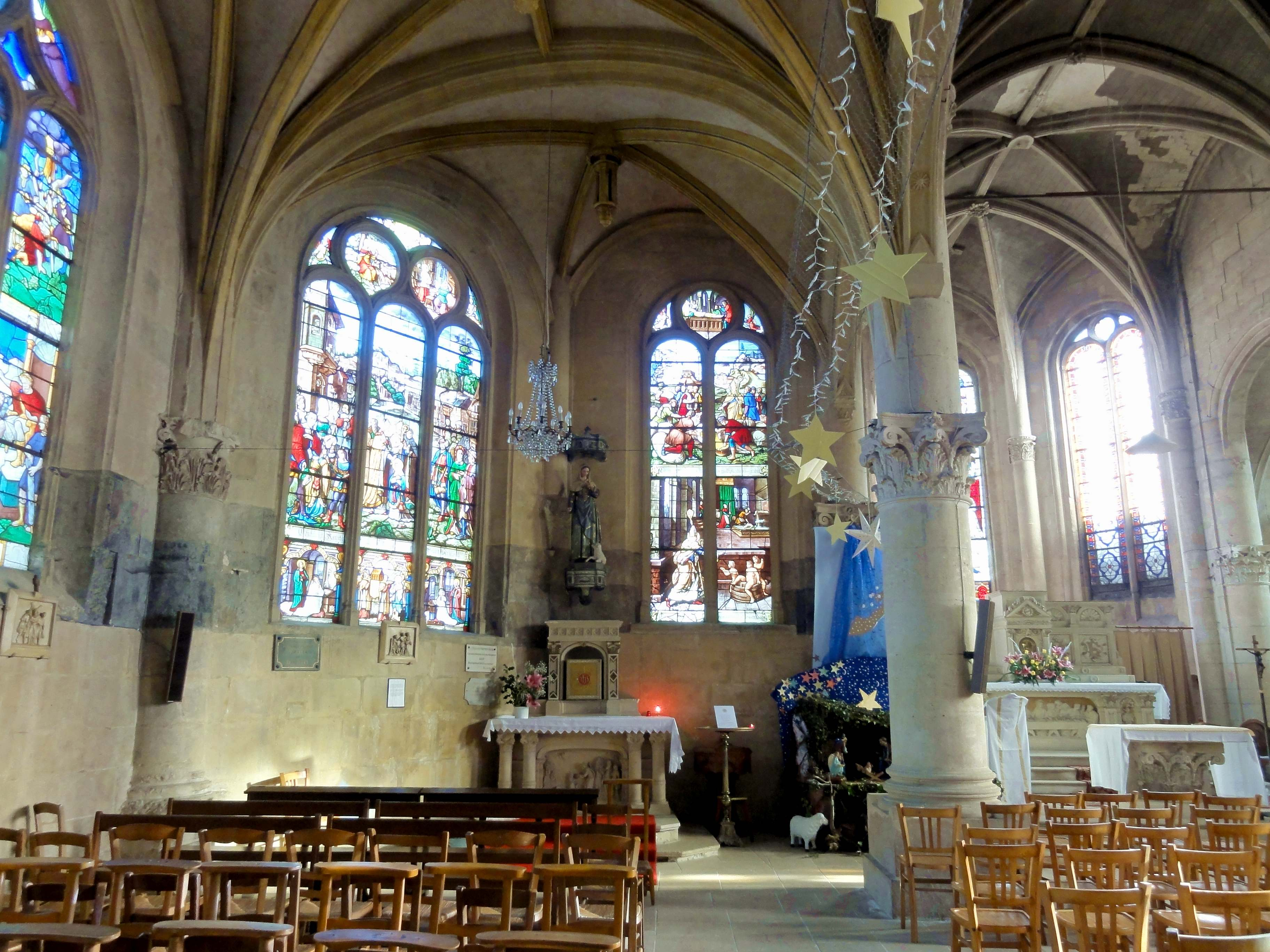 Collatéral nord, vue vers l'est.